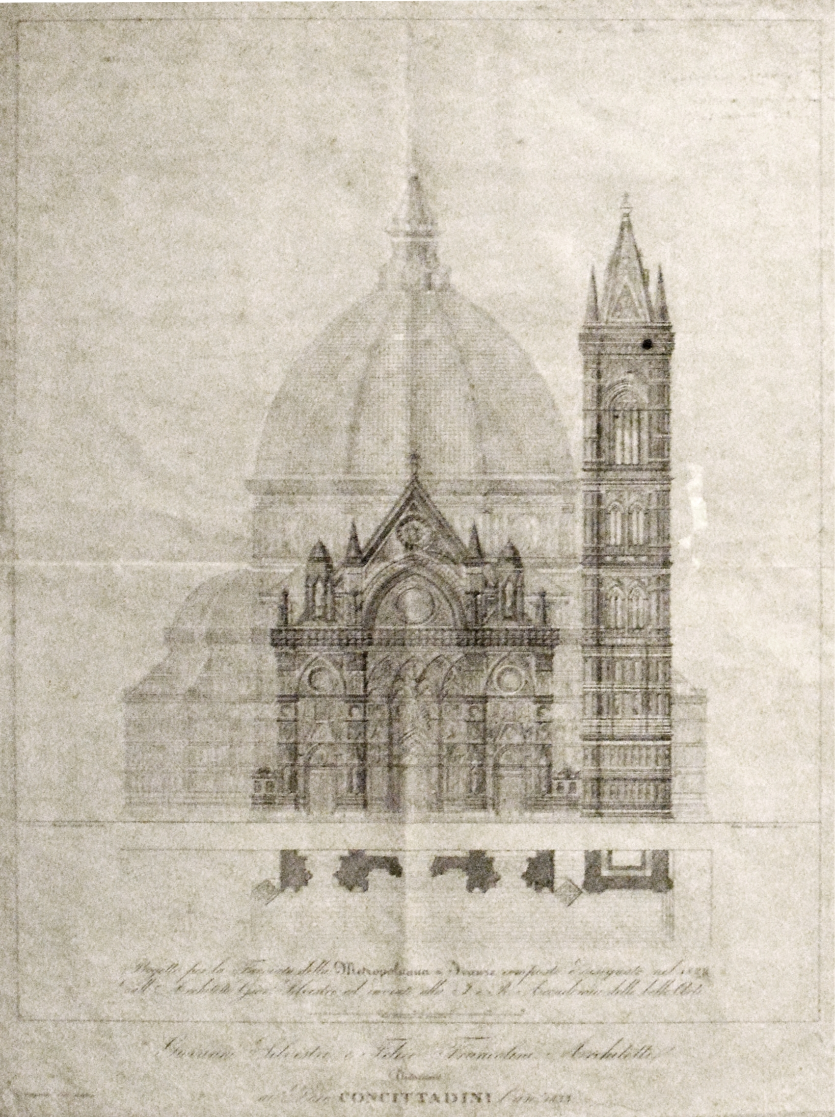 Progetto di Giovanni Battista Silvestri per la facciata della cattedrale di Firenze (1822) in una stampa del 1833 a cura dello stesso autore e dell'architetto Felice Franciolini, esposta presso il Museo dell'Opera del Duomo di Firenze.